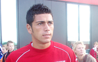 Uitsnede van de foto van de voetballer Graziano Pellè op de eerste training van het seizoen 2007/2008 bij AZ Alkmaar.